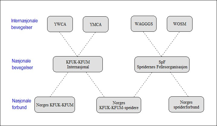 Organisasjonskart for KFUK/KFUM og speiderne